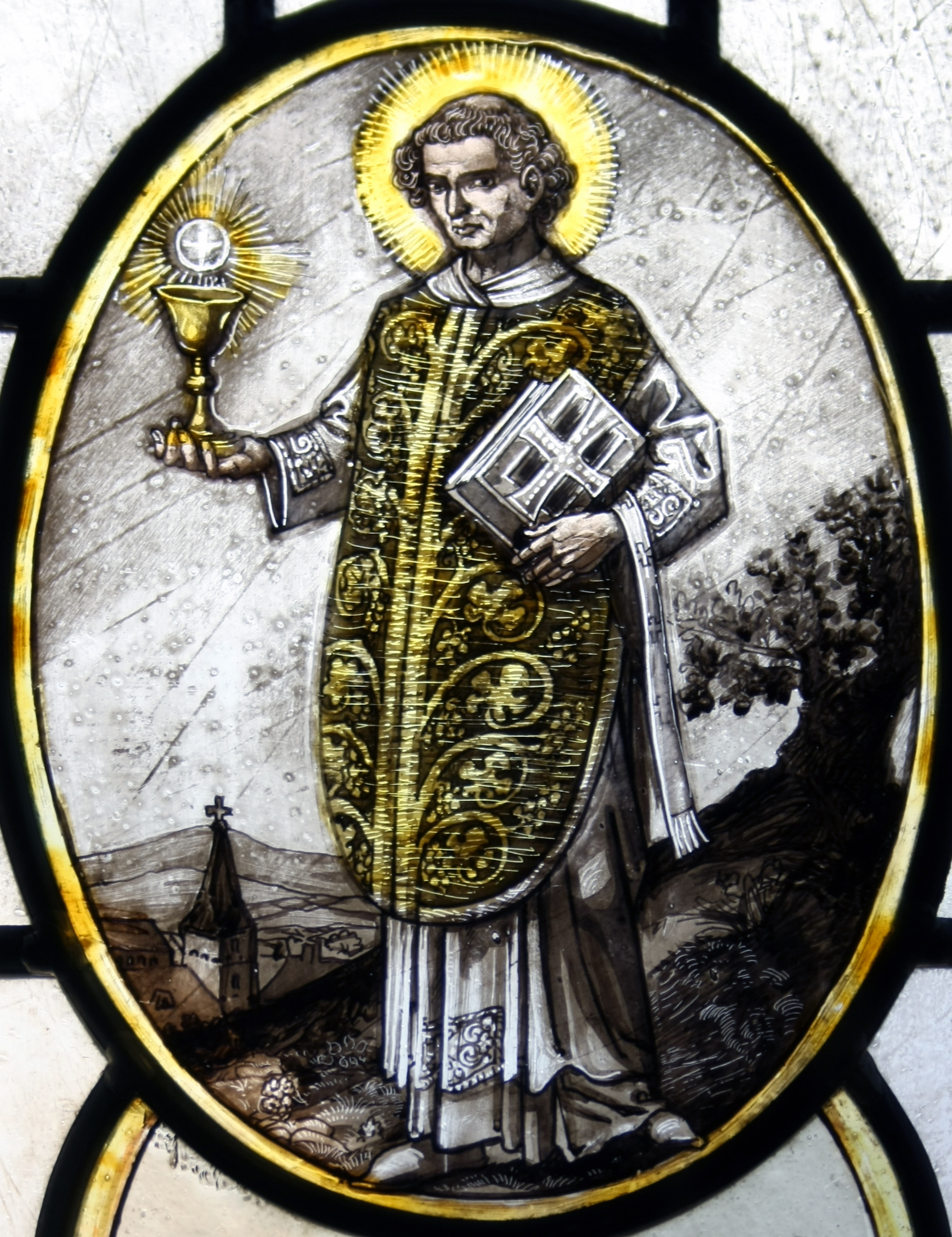 Detail eines Bleiglasfensters in der katholischen Pfarrkirche St. Lubentius in Kell, Darstellung: hl. Lubentius